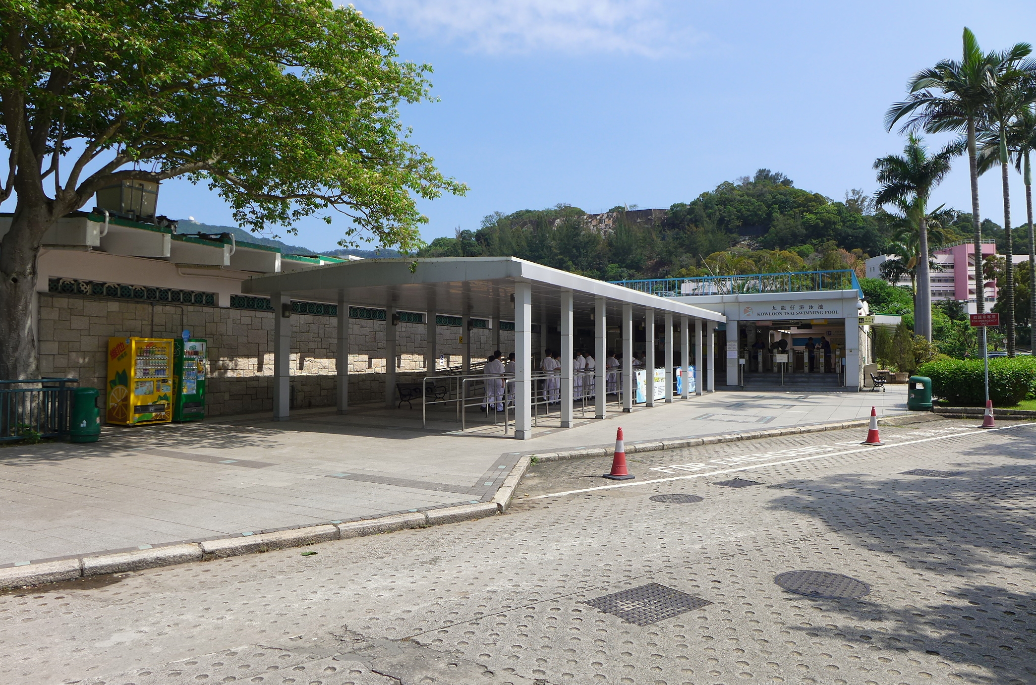 Kowloon Tsai Swimming Pool